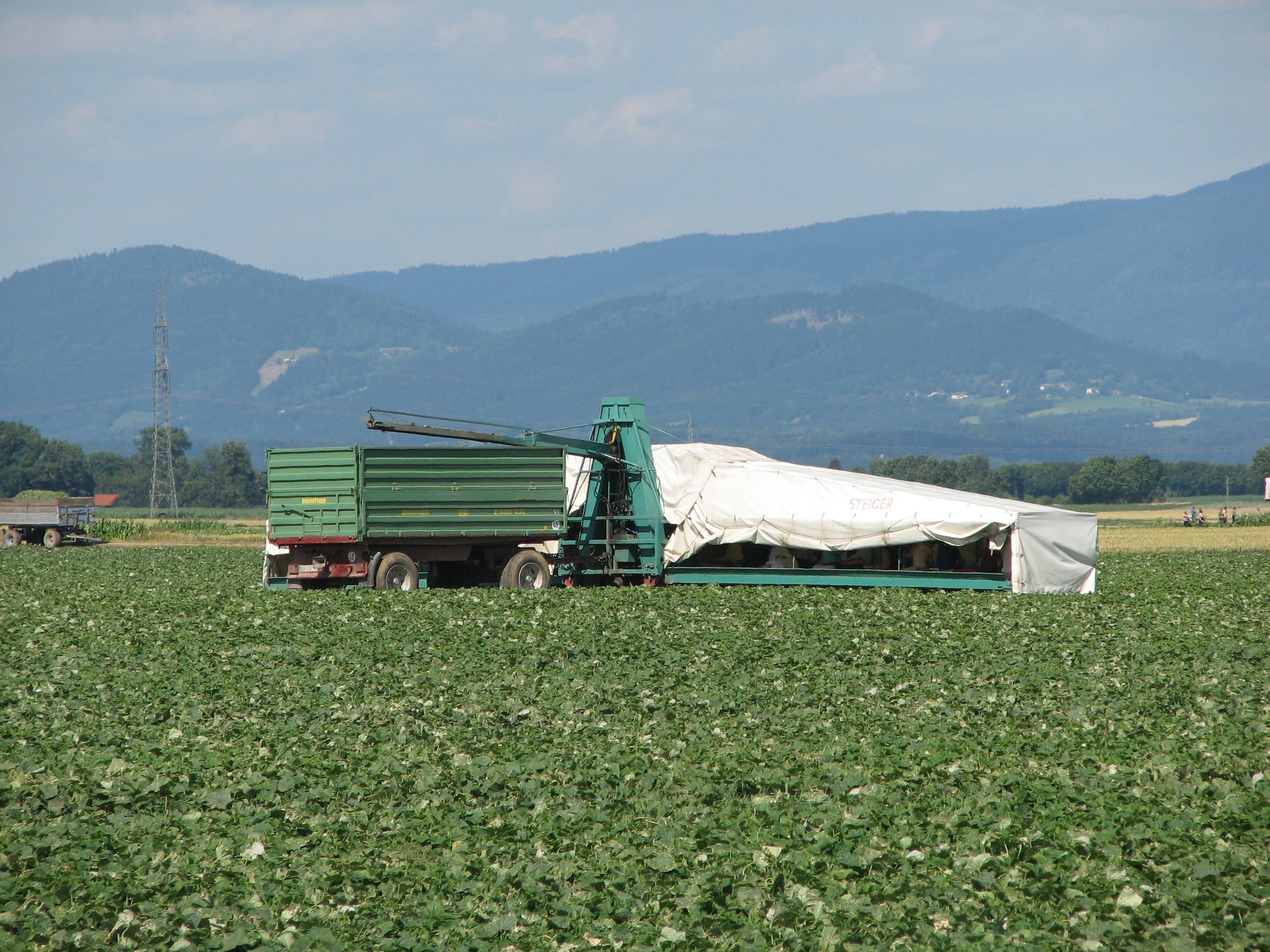 Brantner-Hänger und Gurkenflieger auf einem Gurkenfeld (Cucumis sativus) bei Wallersdorf in Niederbayern, Deutschland